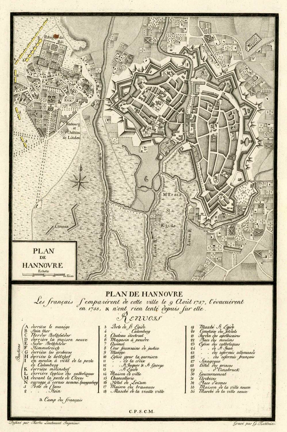 Stadtplan Hannoverund Umgebung zur Zeit des Siebenjährigen Krieges mit den gelb markierten Militärlagern der französischen Truppen (links auf der Karte) am 9. August 1757 vor Linden ...